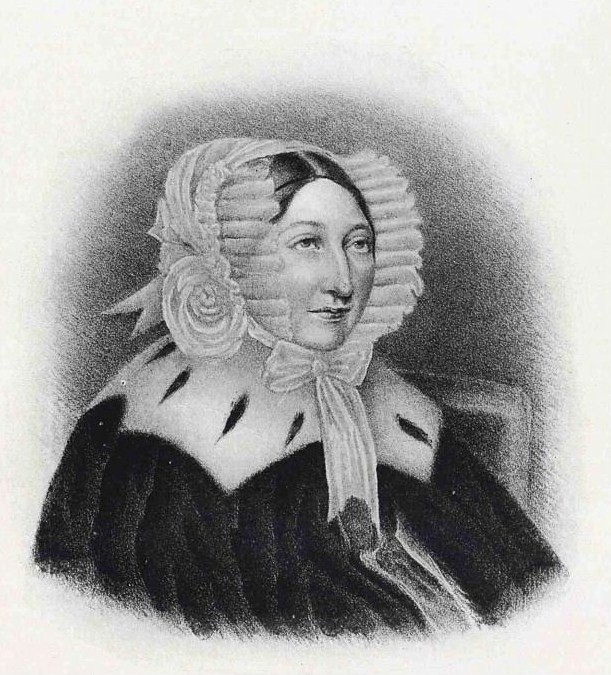 Роксандра Скарлатовна Эдлинг, ур. Стурдза (1786 — 1844), фрейлина, автор мемуаров.